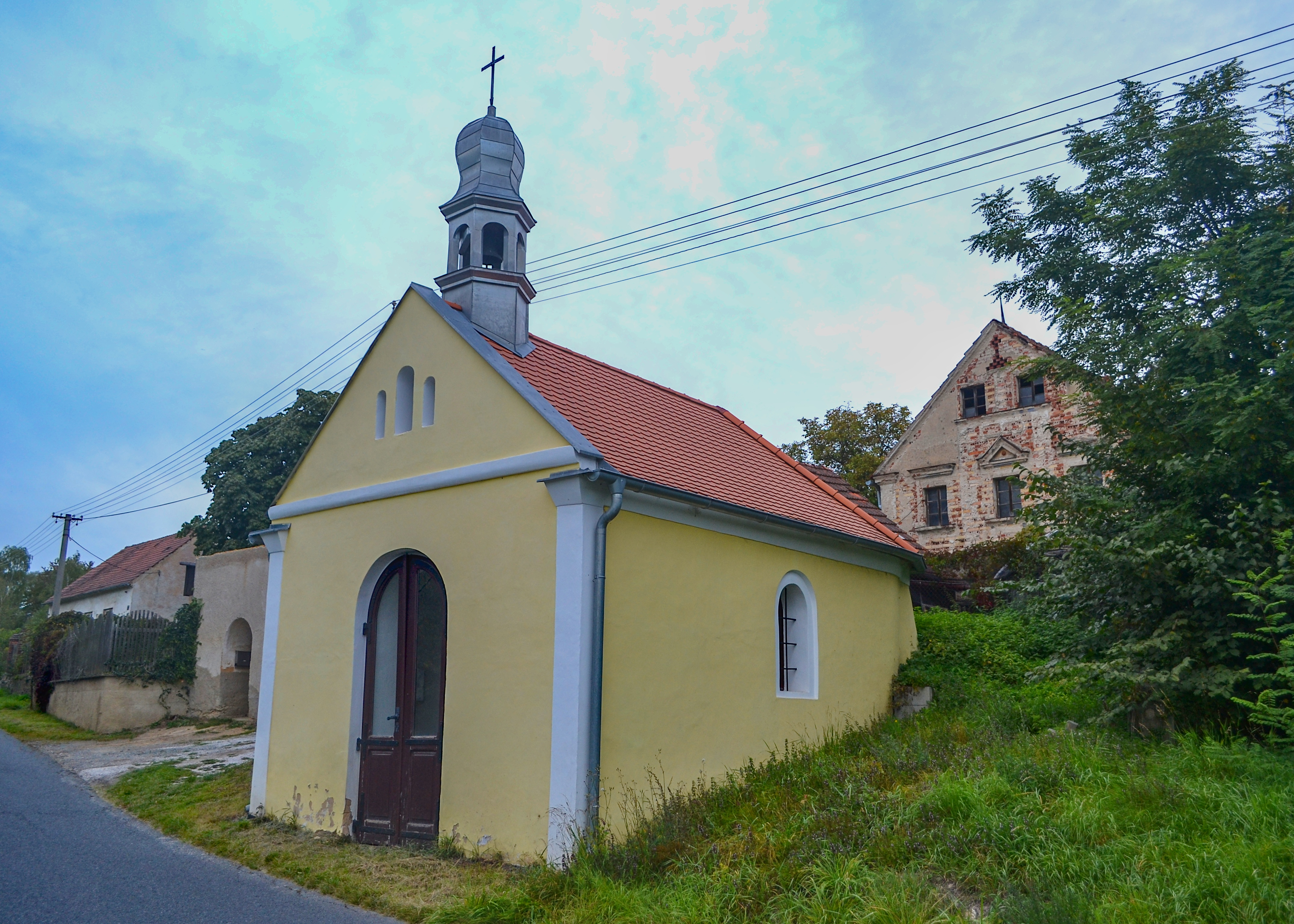 Kurojedy, ves je poprvé zmiňována r. 1177, kdy ji kníže Soběslav II. daroval klášteru v Kladrubech.V r. 1678 celá ves vyhořela. V 17.-19. stol. náležela větší část vsi borskému panství, menší část k Plané. V r. 1938 měla ves 43 usedlostí a 212 obyvatel. V r. 1991 žilo ve vsi ve 20 usedlostech 72 obyvatel. Poté se počet obyvatel zvýšil, díky postavení Domova pro seniory. Ves je oživena dvěma rybníky uprostřed návsi a nevelkou kaplí sv. Vavřince, která prošla v roce 2016 rekonstrukcí.